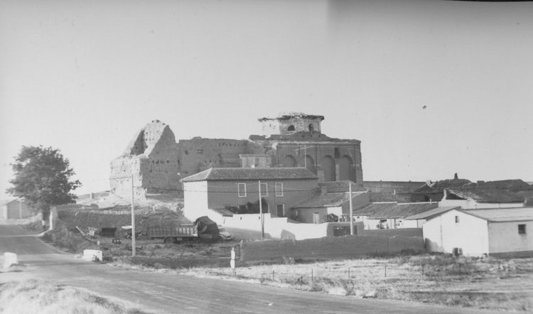 Iglesia de San Juan. Ruinas - Moral de la Reina (Valladolid) - Álbum 200 x 140 - Fotografía. Papel 115 x 70 B/N